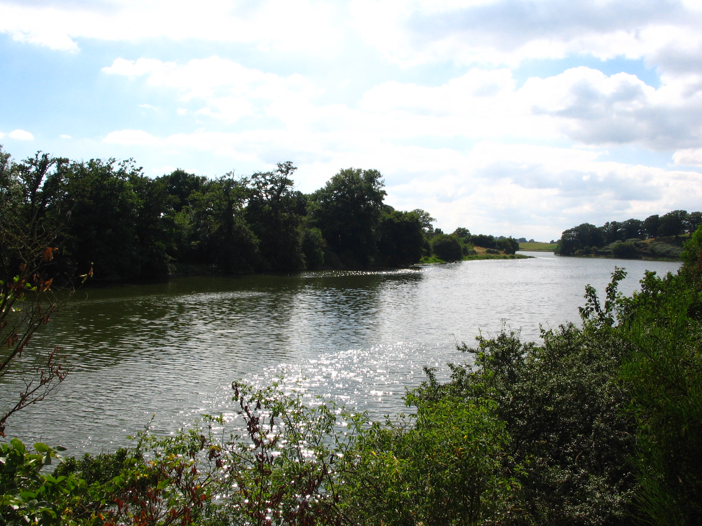 Autre aperçu lac du Verdon (Maine-et-Loire).